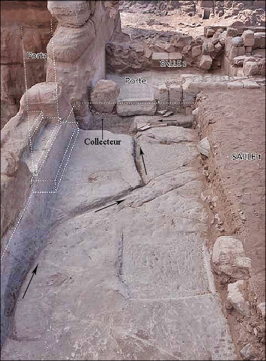 Caniveaux creusés dans le sol de la salle 1 aux thermes de Khubthah pendant les fouilles de 2017.